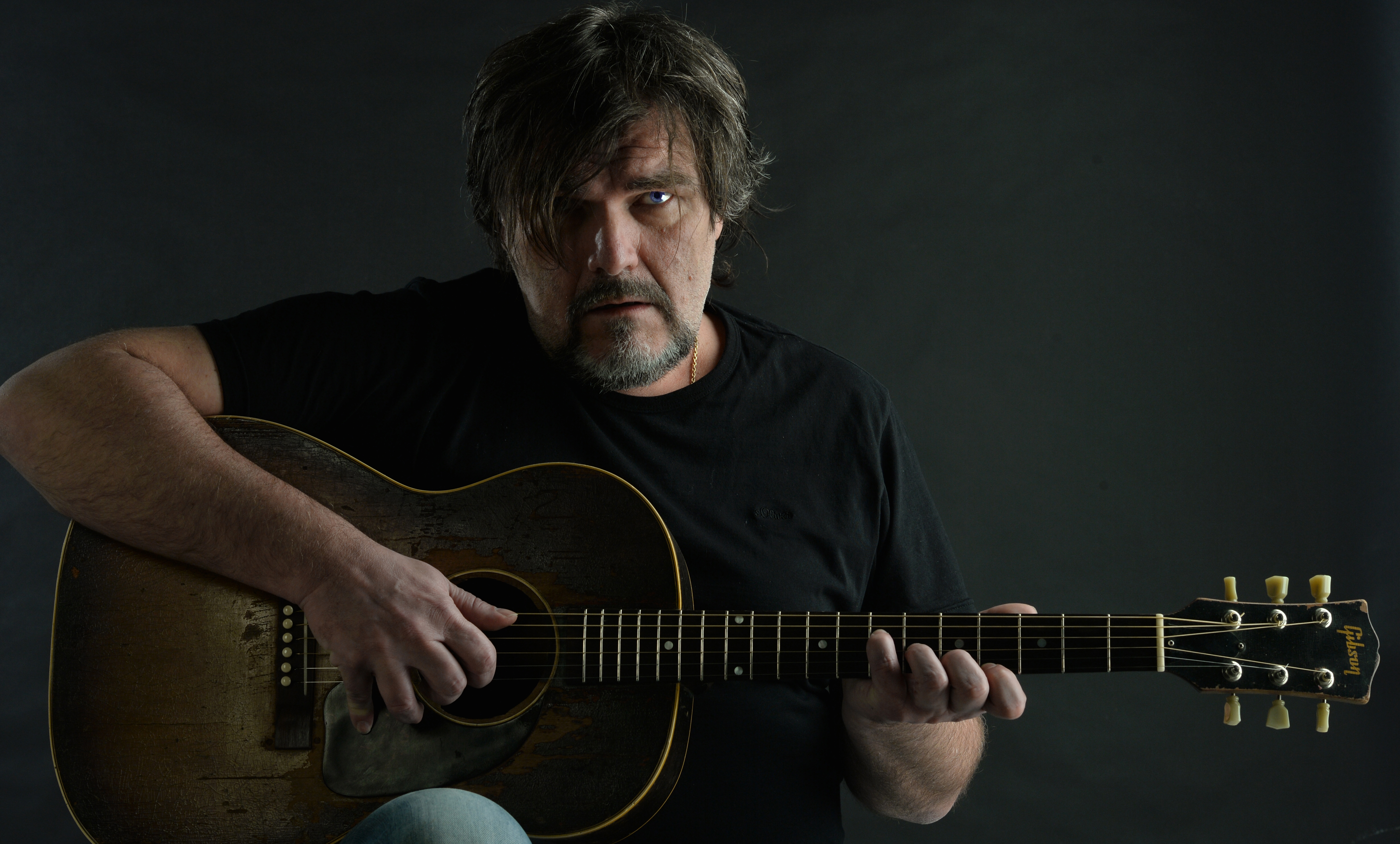 Roman Horký, 2016